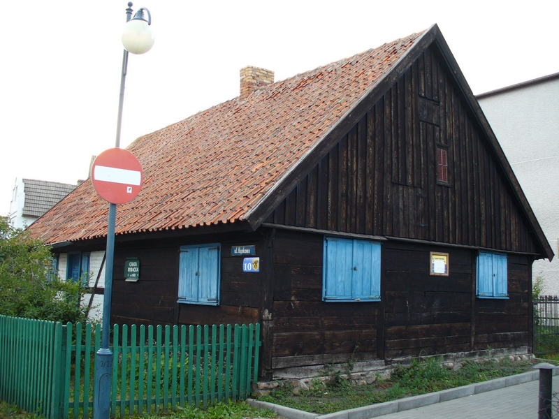 Chata rybacka z 1881 r. - muzeum, Jastarnia, Polska